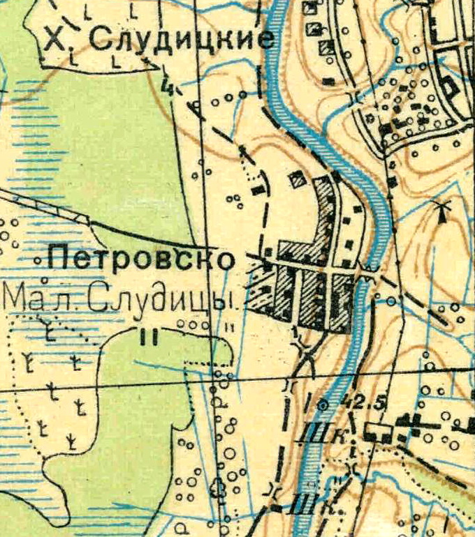 Топографическая карта Ленинградской области, квадрат О-36-25-Б-б (Бол. Слудицы), деревня Малые Слудицы